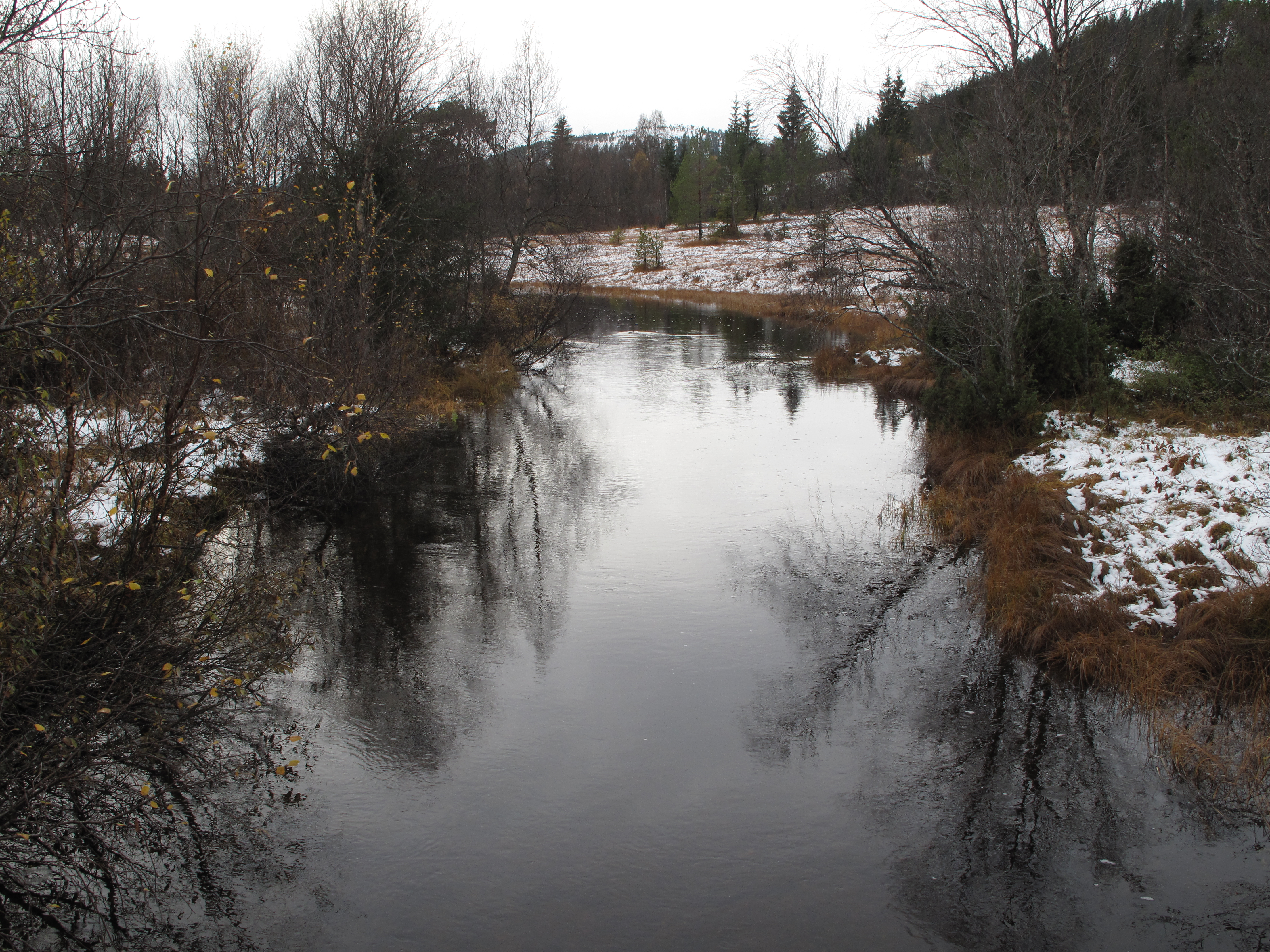 Fjellkjøselva